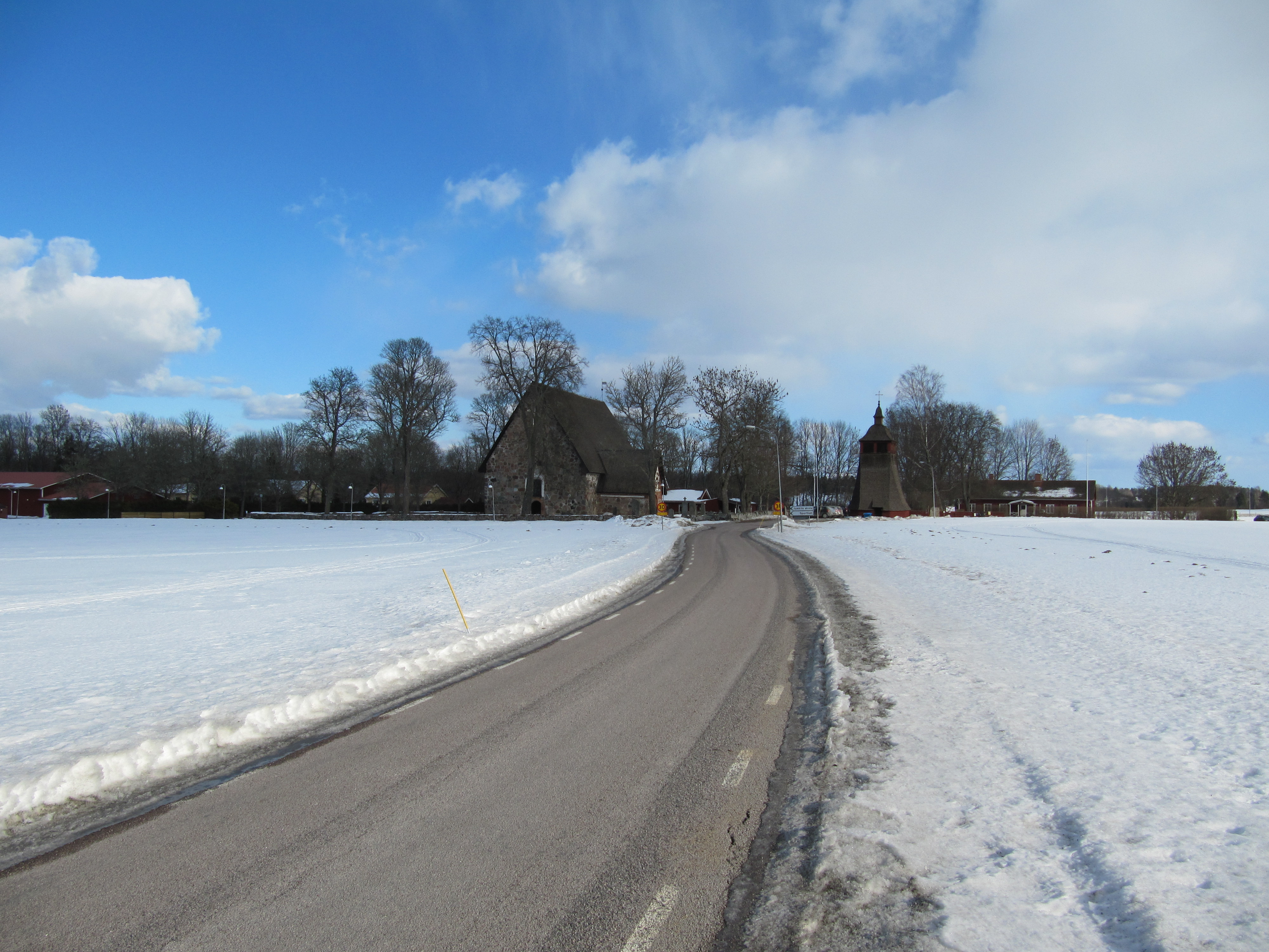 Jumkil